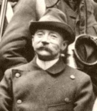 Fotografie von Georg Kautz (1860-1940)